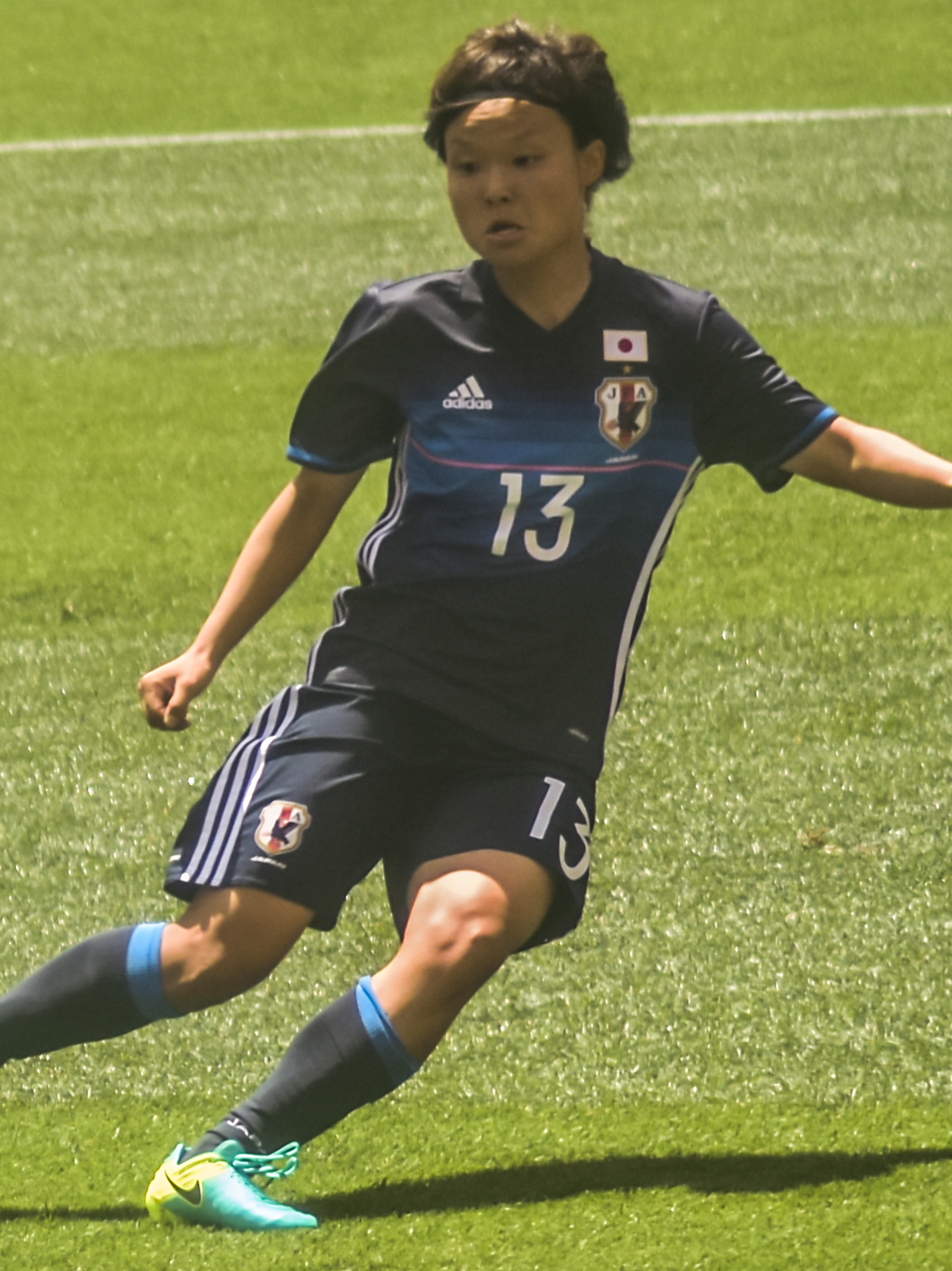 From Flickr user edrost88, match details here